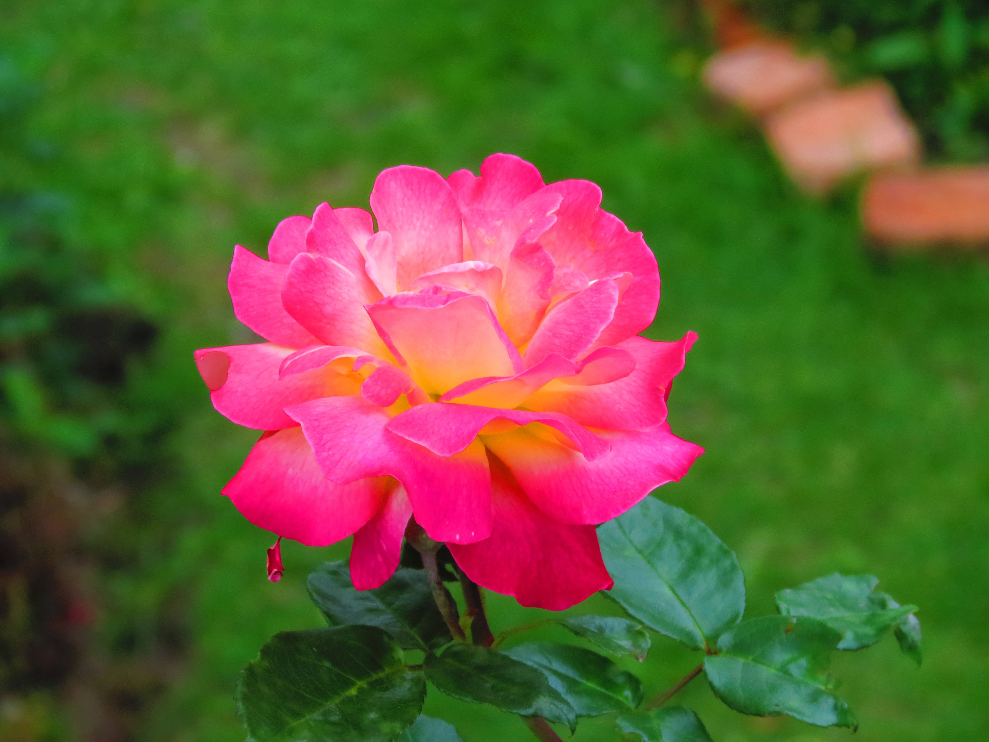 Preciosa Rosa perteneciente a la Flora Venezolana en la Colonia Tovar, Estado Aragua.